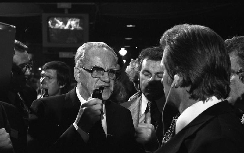 Bundestagwahl - Wahlnacht in der SPD - Bundesgeschäftsstelle